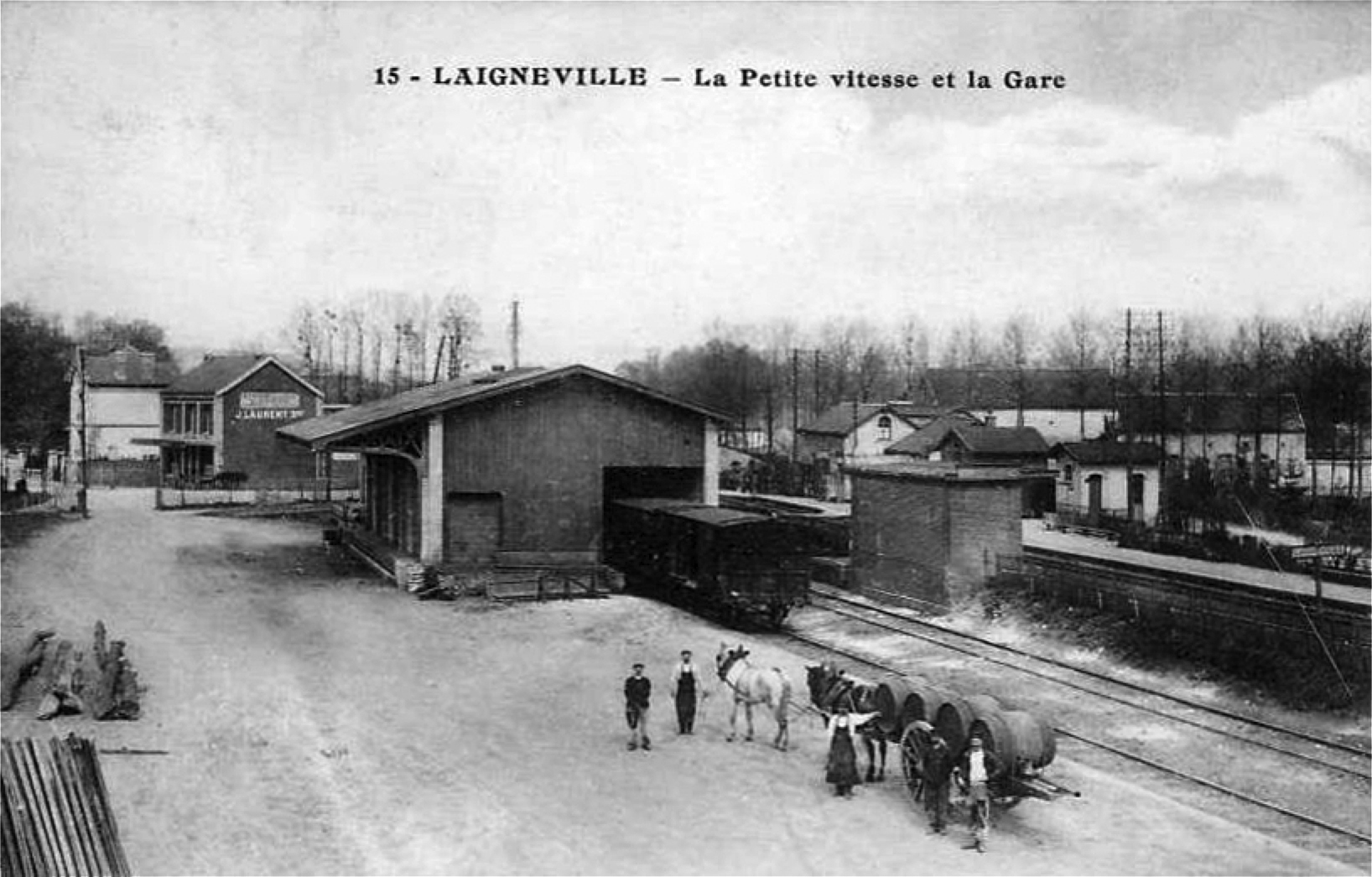 L'intérieur de la gare de Laigneville avec la hall à marchandise.